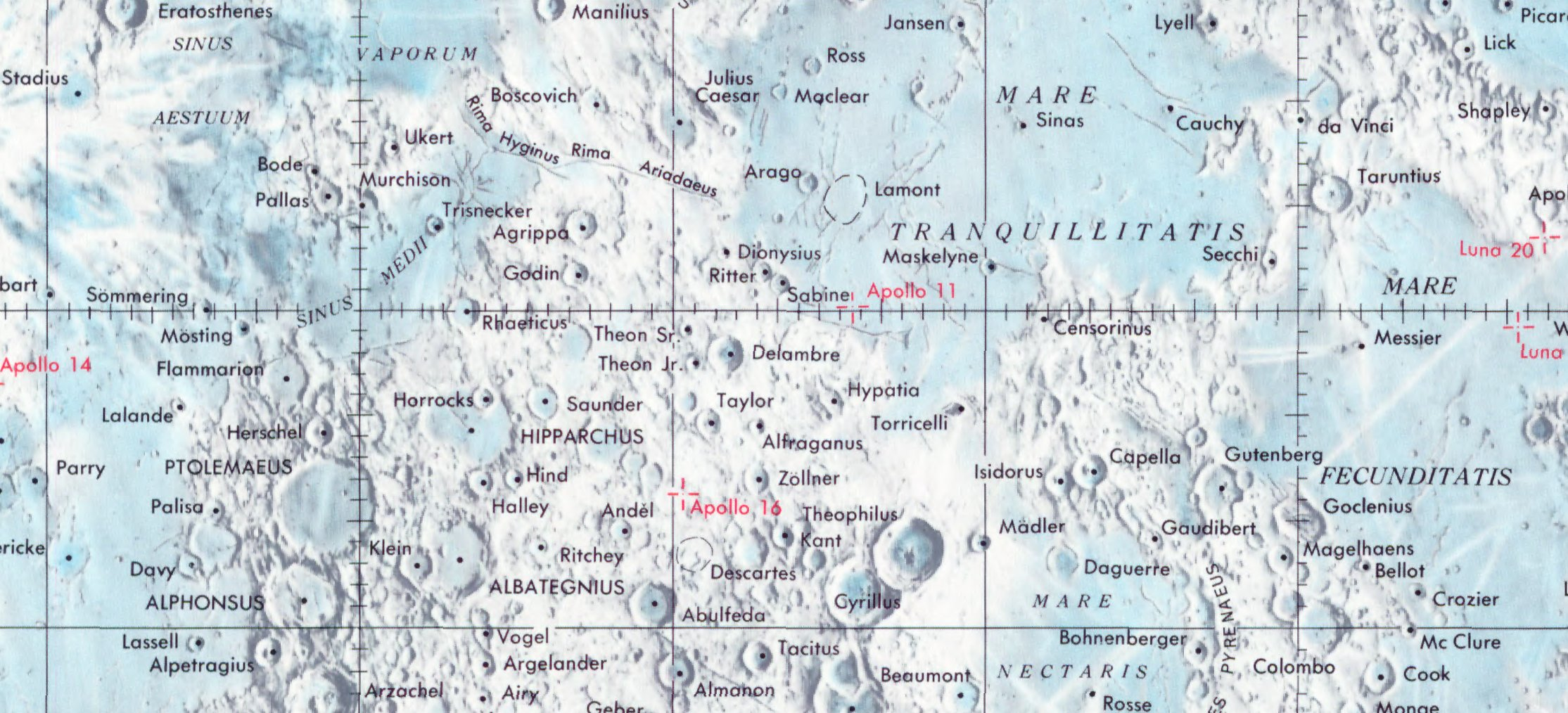 Cráter lunar . Localización. (Lunar Chart LPC1. Second Edition)